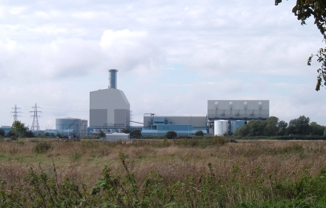 Kings Lynn Power Station